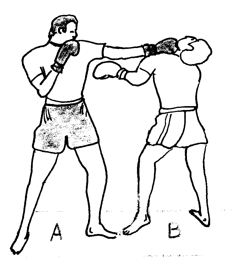 allonge.jph